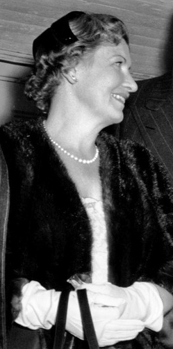 Professor Bertil Ohlin, fru Anna-Lisa Björling, ambassadör John M. Cabot och Jussi Björling.Med anföranden av den amerikanske ambassadören John M. Cabot och professor Bertil Ohlin samt sång av Jussi Björling högtidlighöll Svensk-amerikanska sällskapet på söndagskvällen Förenta Staternas nationaldag. Evenemanget ägde rum på Solliden på Skansen inför en fulltalig publik, varibland märktes ett stort antal svensk-amerikaner.